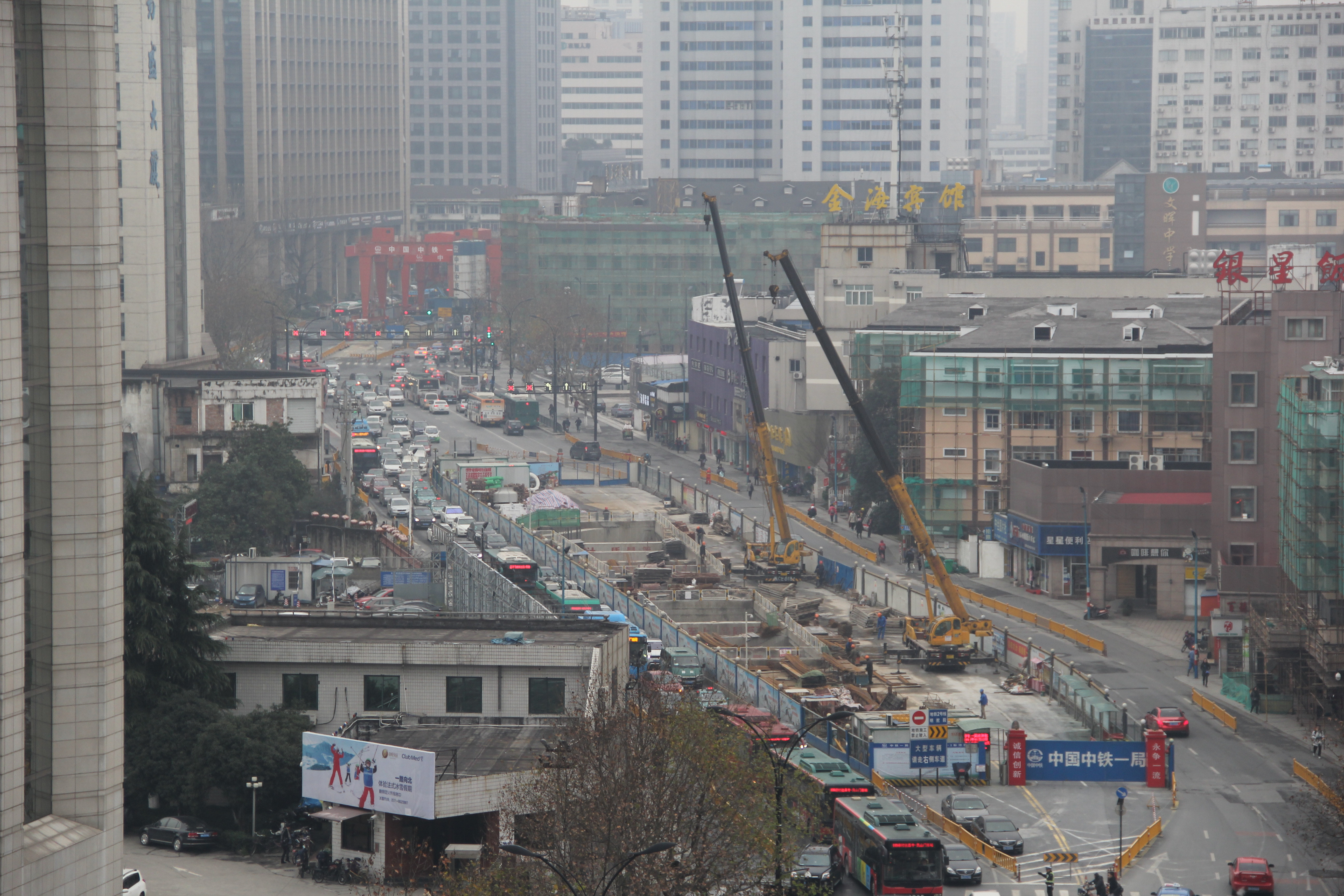 建设中的2号线沈塘桥站，远处为站体，近处为折返线明挖基坑